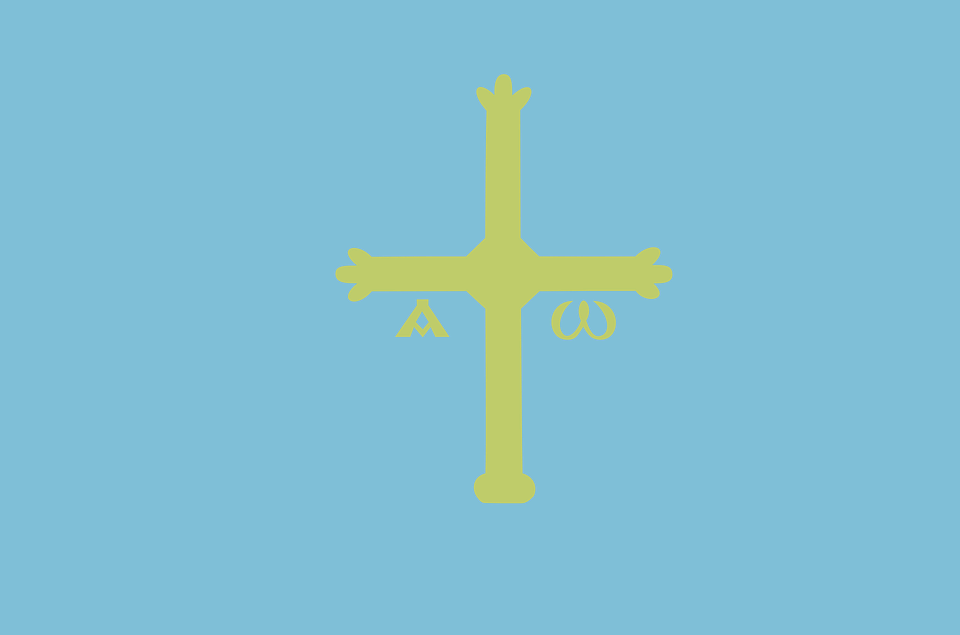 Fotografía de la bandera asturiana